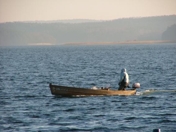 Fisherman on the Lubie lake, Zachodniopomorskie, Poland, 2006